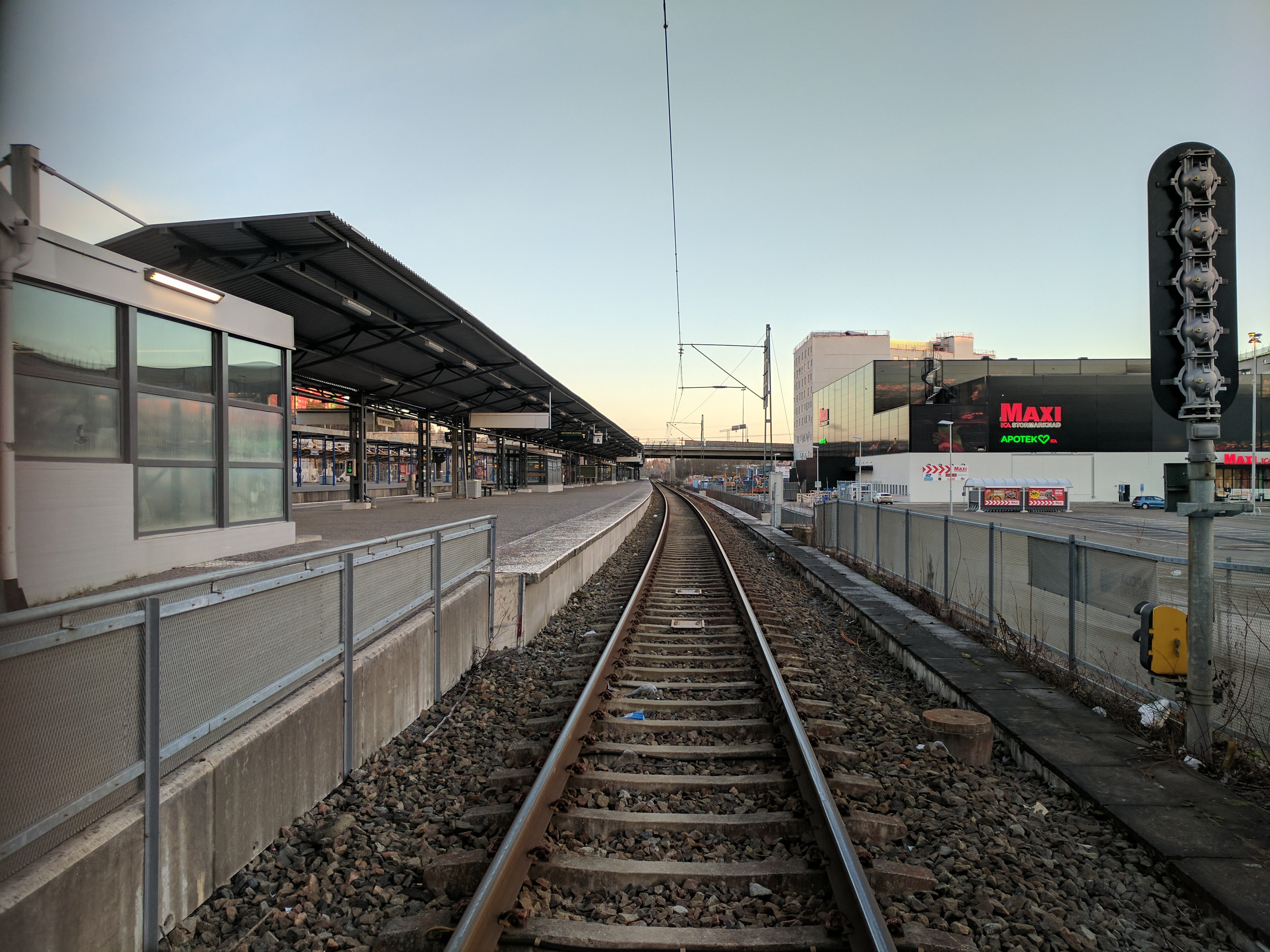 Flemingsberg december 2016